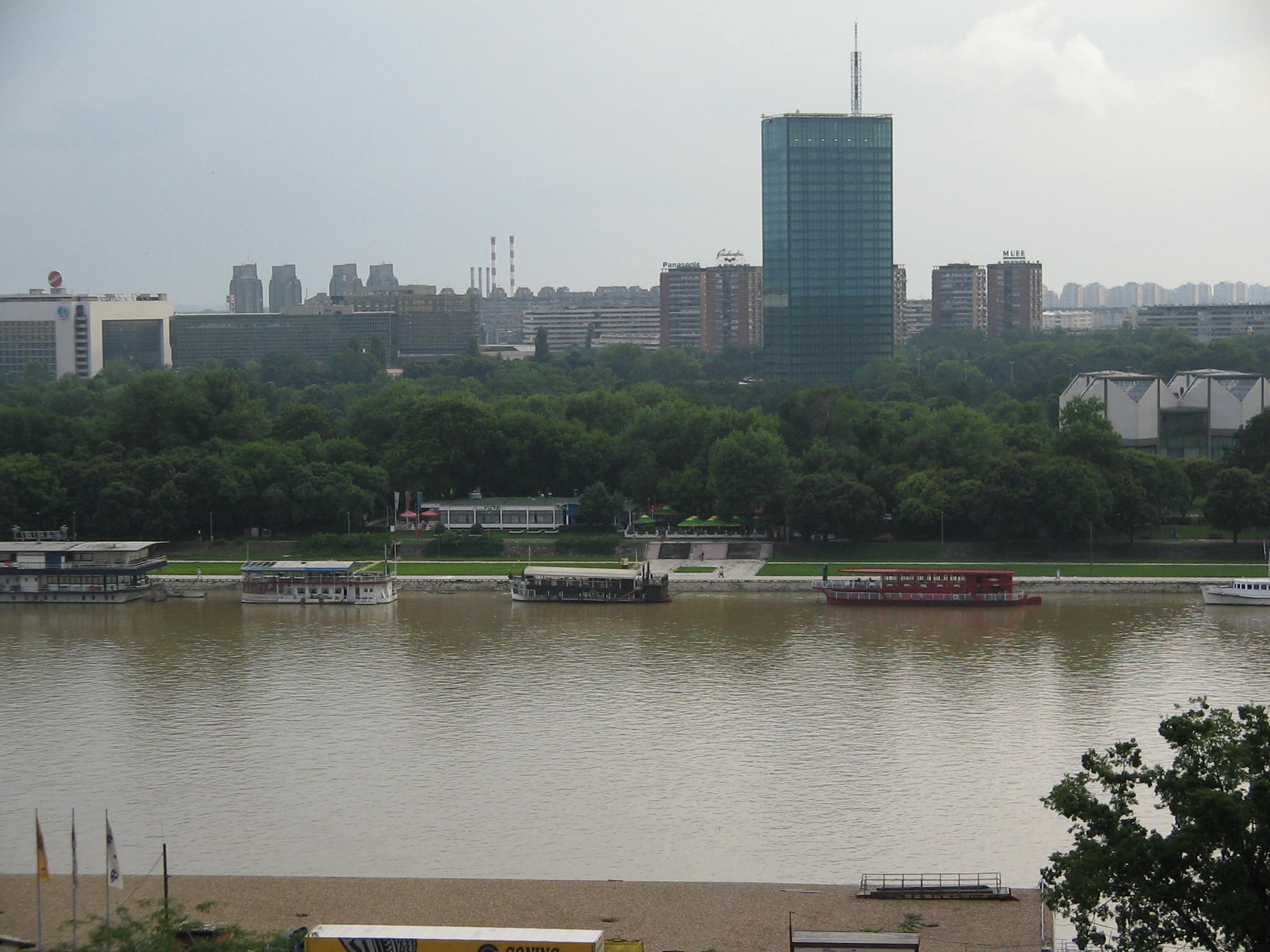 Ушће и Нови Београд